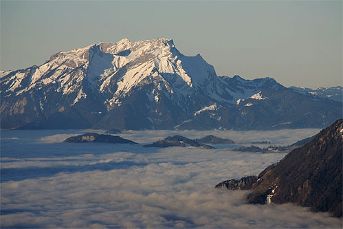 Ausblick vom Spirstock (Hoch-Ybrig) zum Pilatus